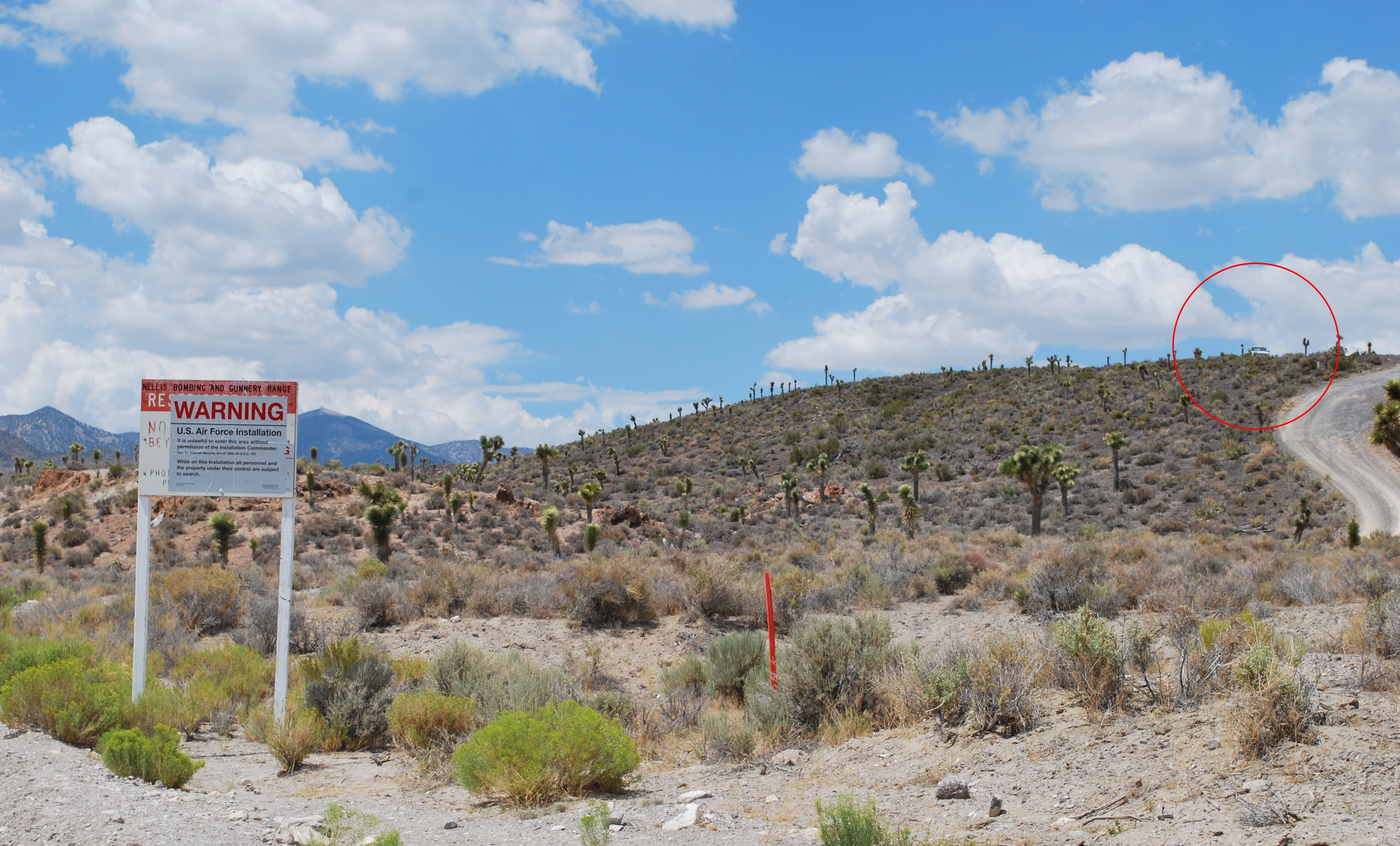 Warnhinweis_und_Sicherheitspersonal_an_der_Groom_Lake_Road